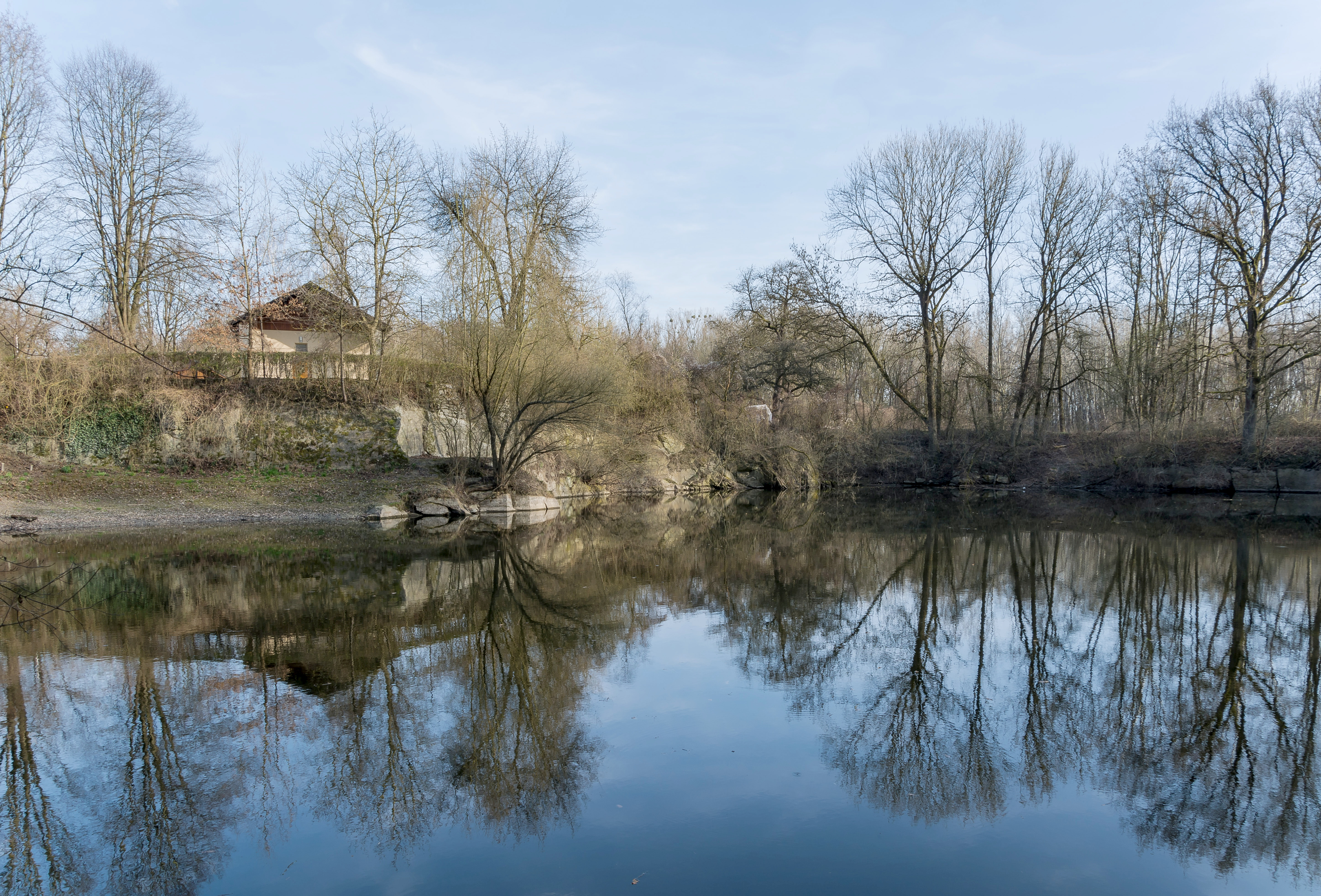 Der Taborteich in Enns (Enghagen) wurde 1983 als landschaftsprägendes Kleinbiotop unter Naturschutz gestellt. Er entstand vermutlich aus einem Granitsteinbruch aus der Römerzeit. This media shows the natural monument in Upper Austria with the ID nd224 (Taborteich).